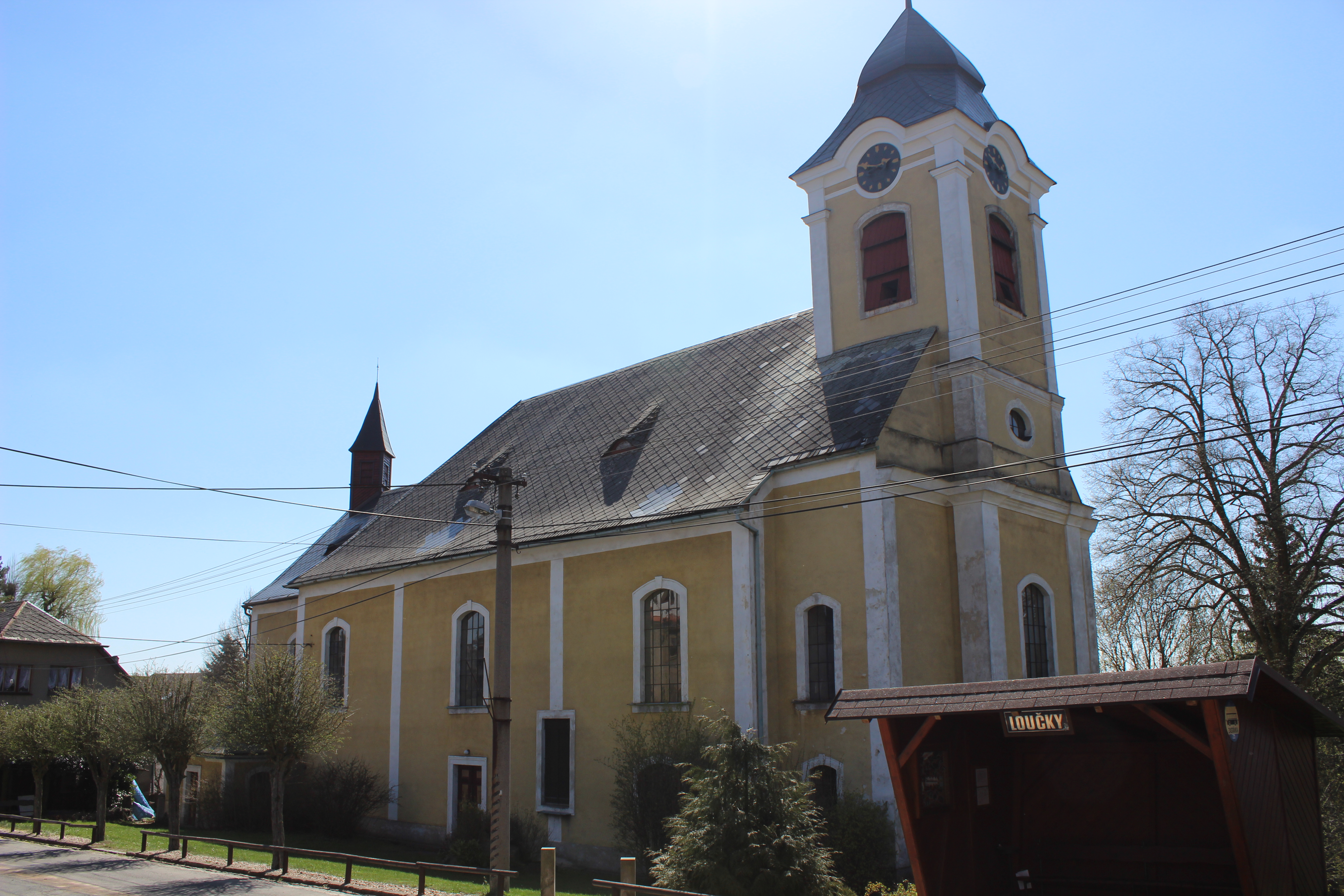 Kostel svatého Antonína Paduánského v Loučkách v okrese Semily.